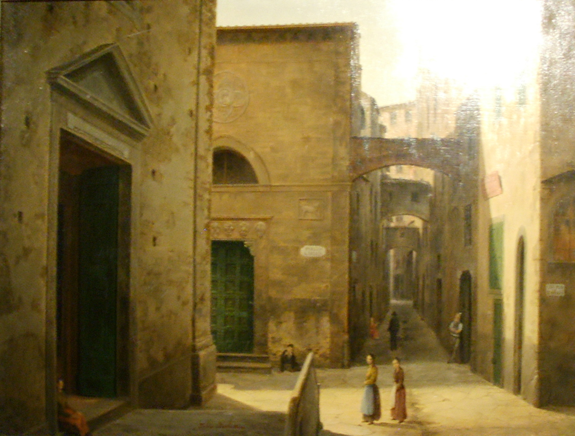 Fabio borbottoni, 1820-1902, chiesa di sant'andrea